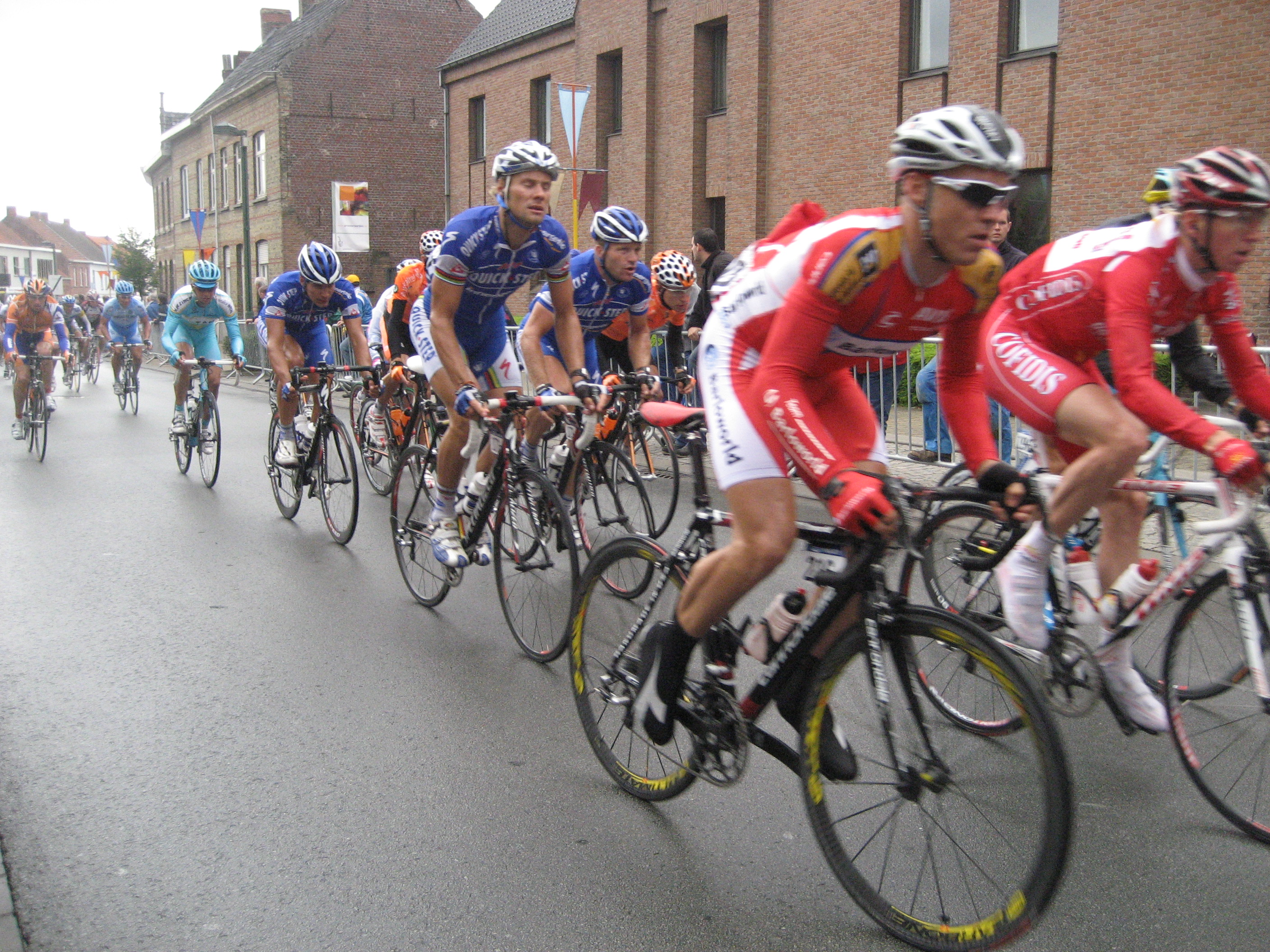 Tom Boonen in Pittem, West-Vlaanderen during the 2007 Tour de France.